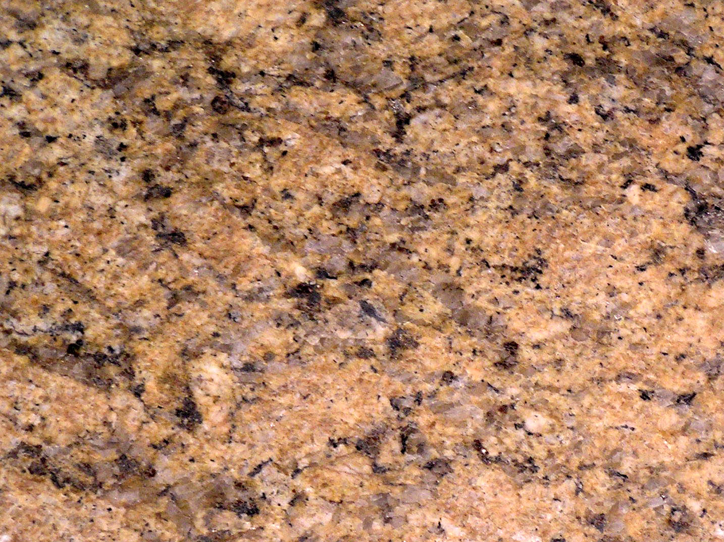 Granit poliert